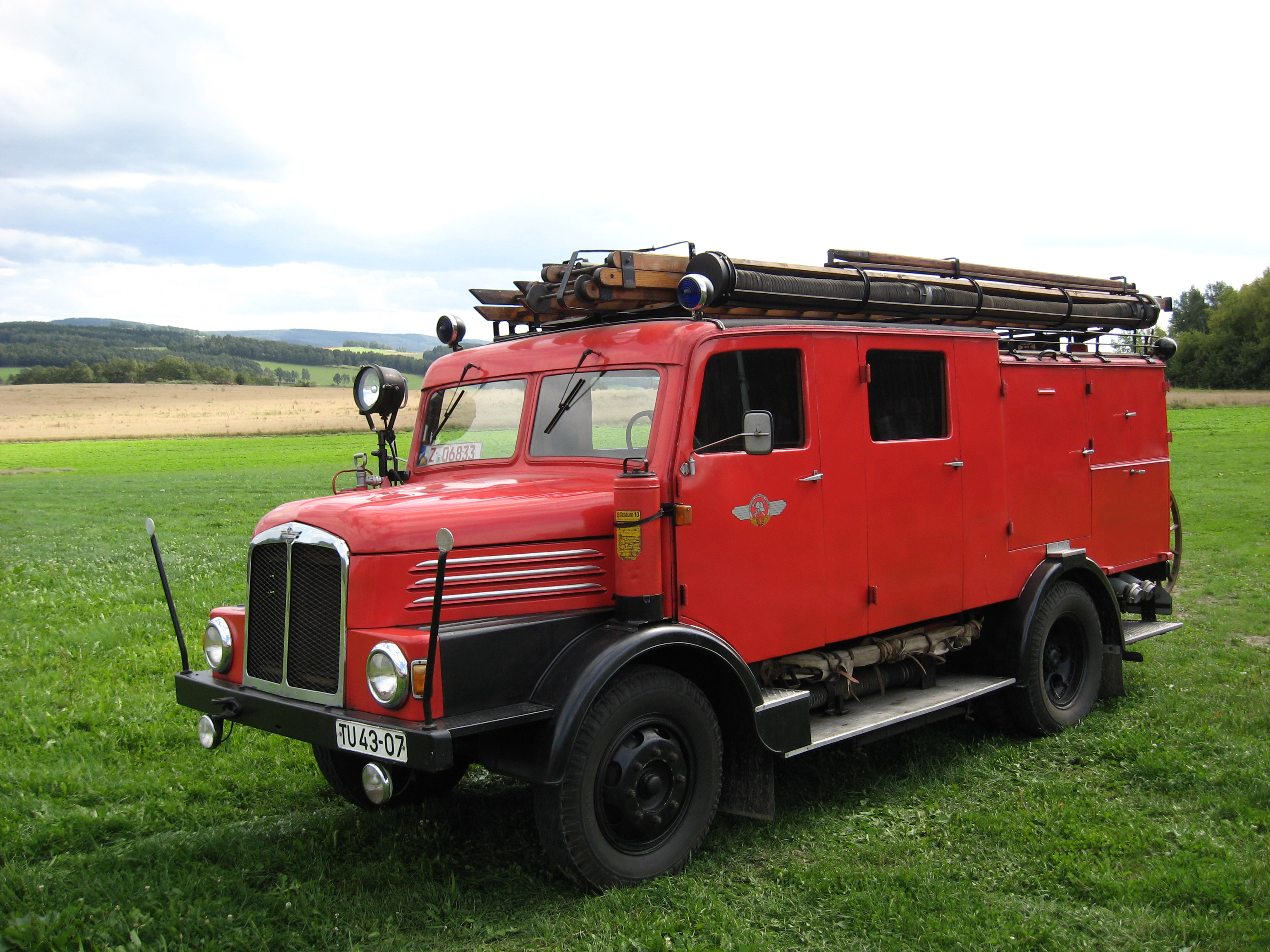 Löschgruppenfahrzeug LF 15 (Bj.1954) Typ IFA-H3A der Freiwiliigen Feuerwehr Wilkau-Haßlau